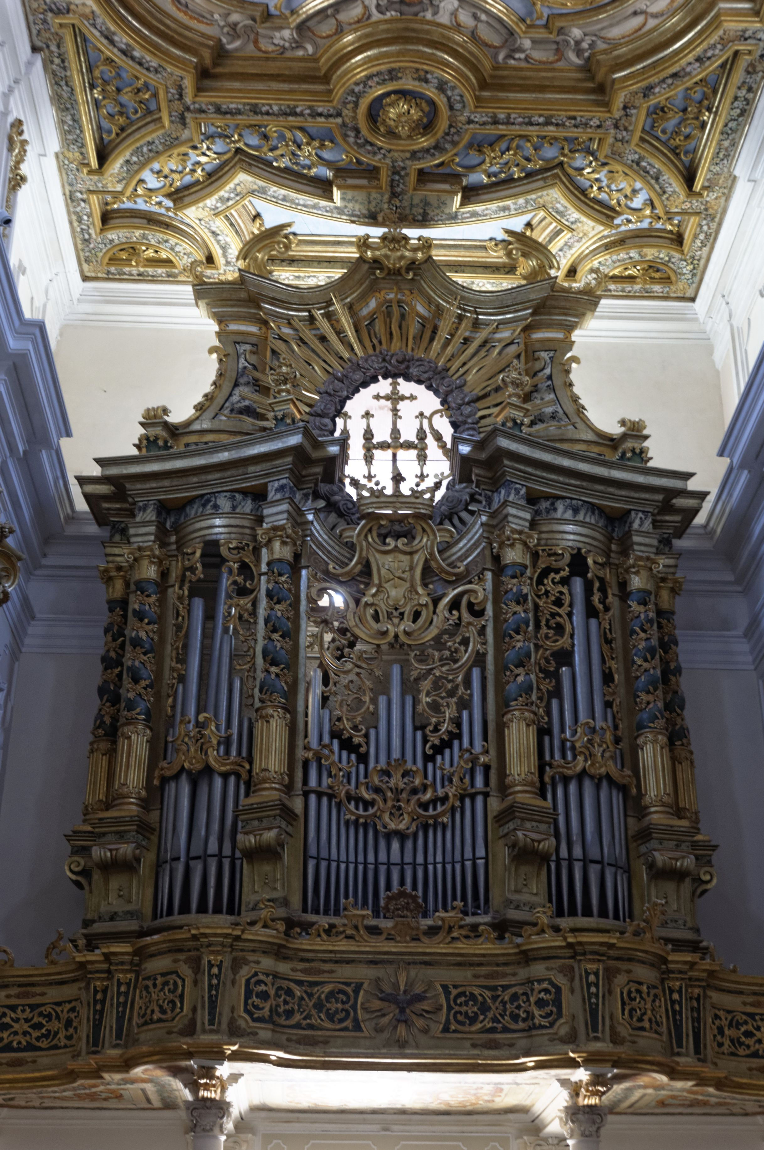 L'Aquila 2017 Dieses Foto entstand in Zusammenarbeit mit Stadtbesichtigungen.de Die Seiten Stadtbesichtigungen.de, der dazugehörige Reise Blog sowie die Facebookseite: Stadtbesichtigungen Rom dürfen dieses Bild für Ihre Veröffentlichungen ohne den Hinweis auf Wikipedia, Commons bzw der Lizenz verwenden. Die Verantwortlichen habe von mir (Ra Boe) die Originaldaten zur freien Verfügung übermittelt bekommen.